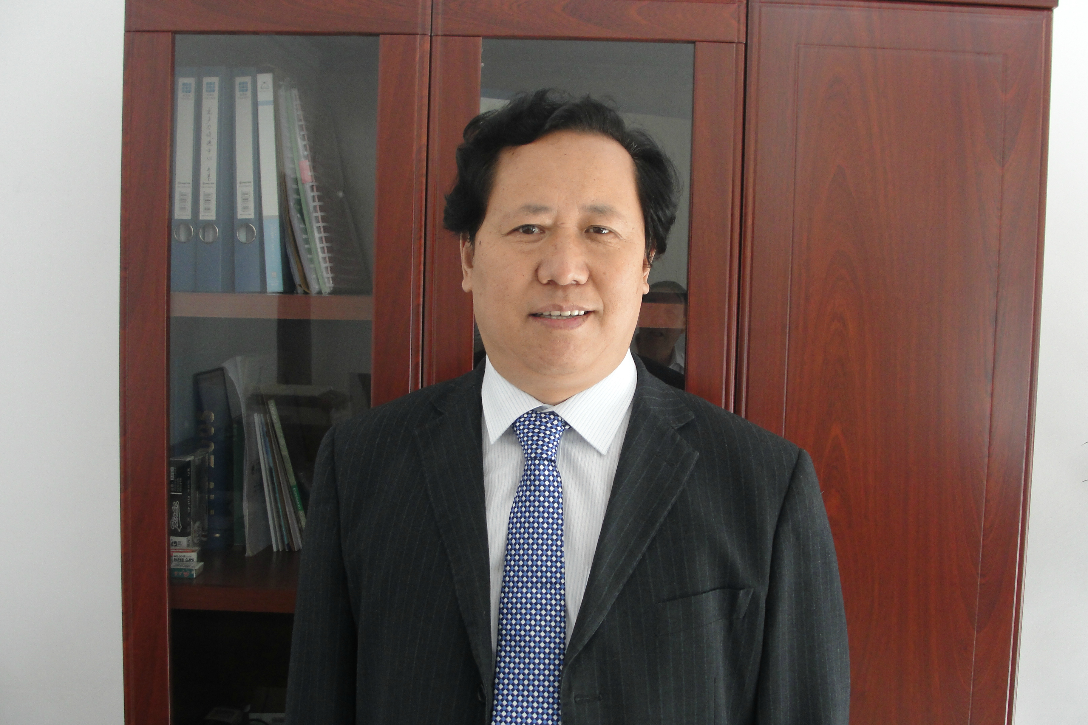 Trezoro Huang Yinba 2014 E-Centro Ora Ponto Ĉinio